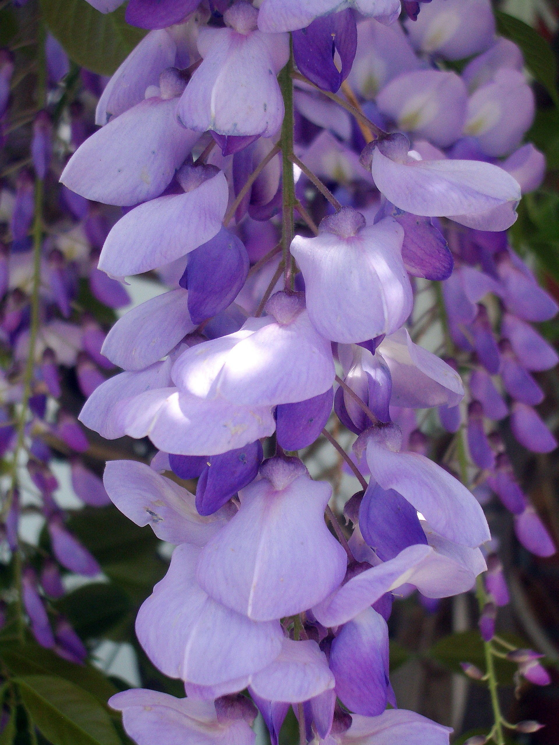 Wisteria sinensis